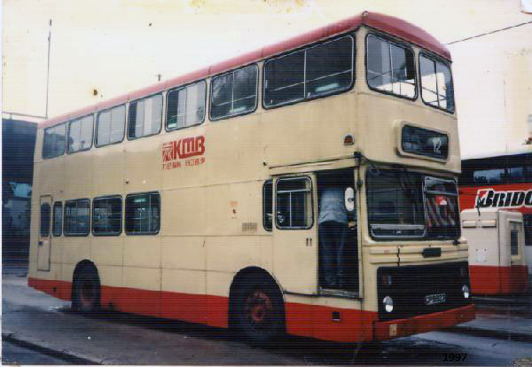 Hong Kong KMB Dennis Jubilant